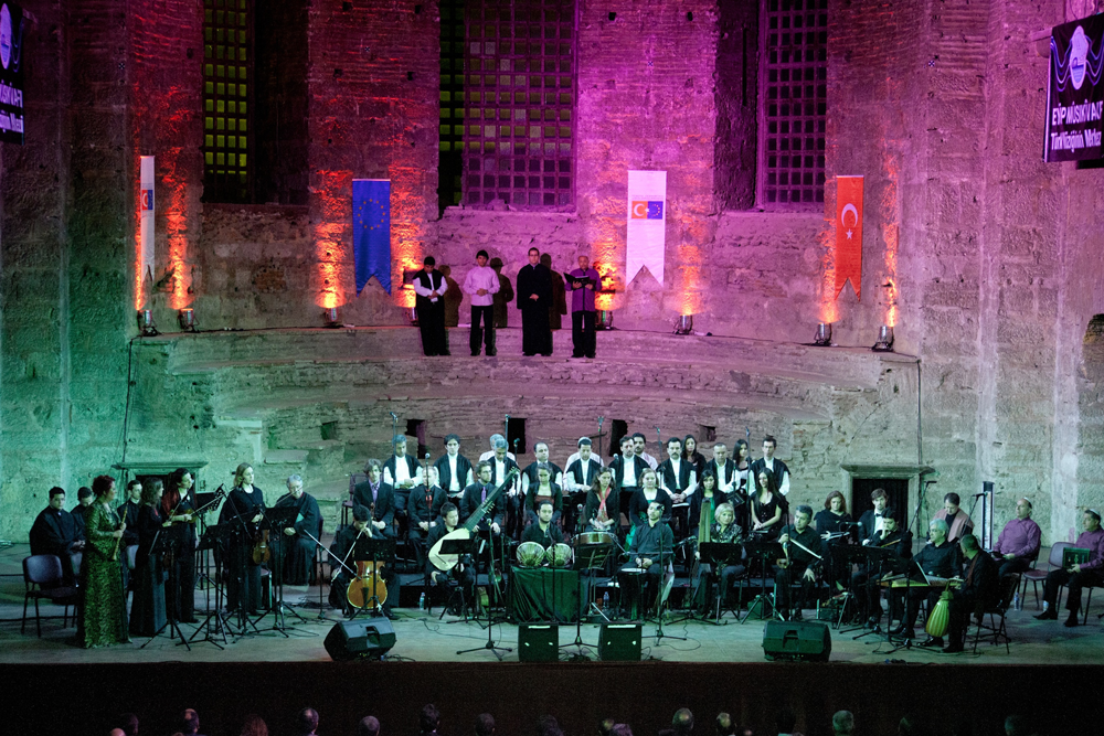 Pera Ensemble ind der Hagia Irena, Istanbul